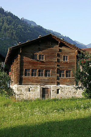 Flüeli-Ranft: Geburtshaus von Bruder Klaus (Niklaus von Flüe)